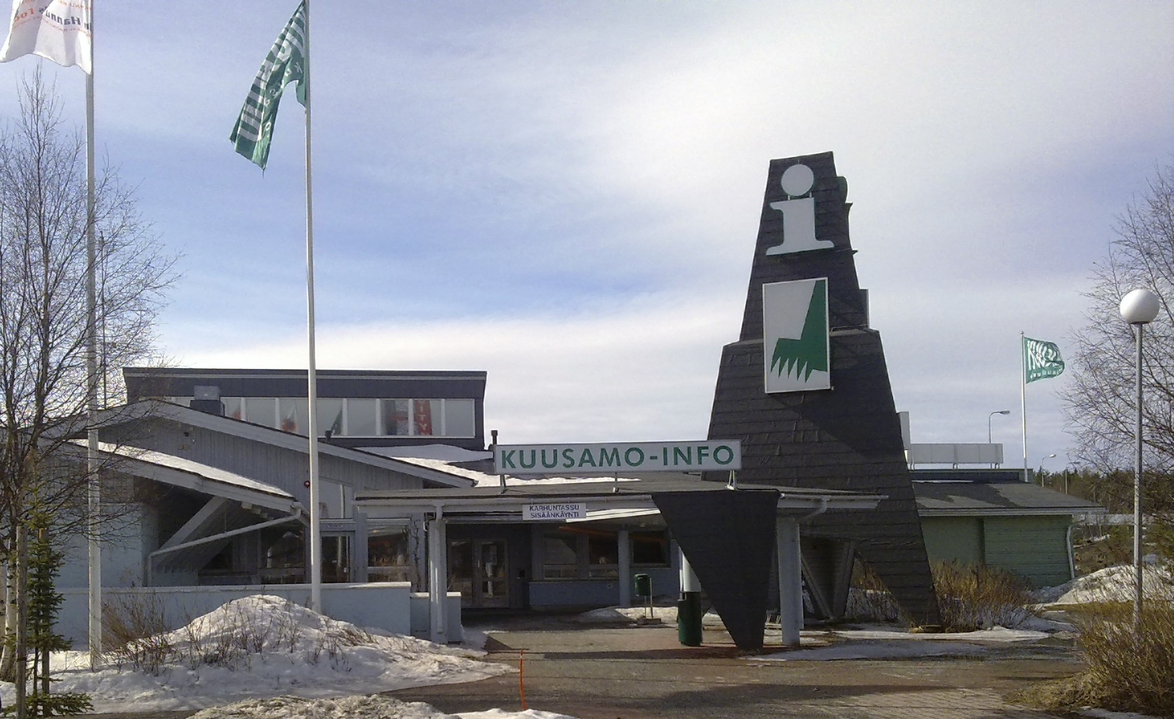 Matkailukeskus Karhuntassu Kuusamossa, Suomessa.